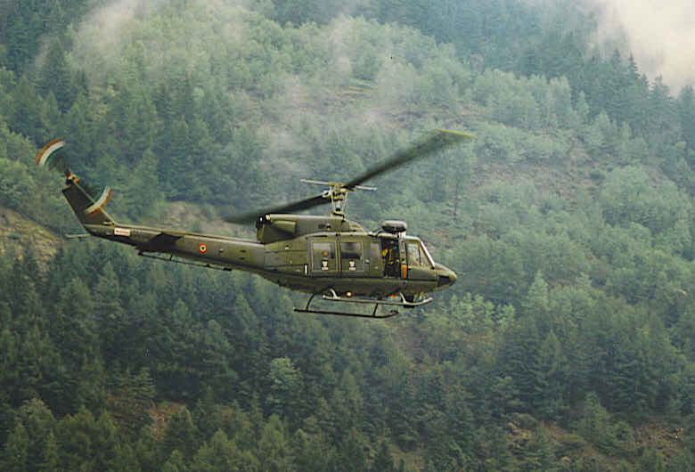 Hubschrauber vom Typ Bell 212 mit Seilwinde; Aufnahmeort: Flughafen Ambri; Bild selbst aufgenommen, Aufnahmedatum vermutlich 1994